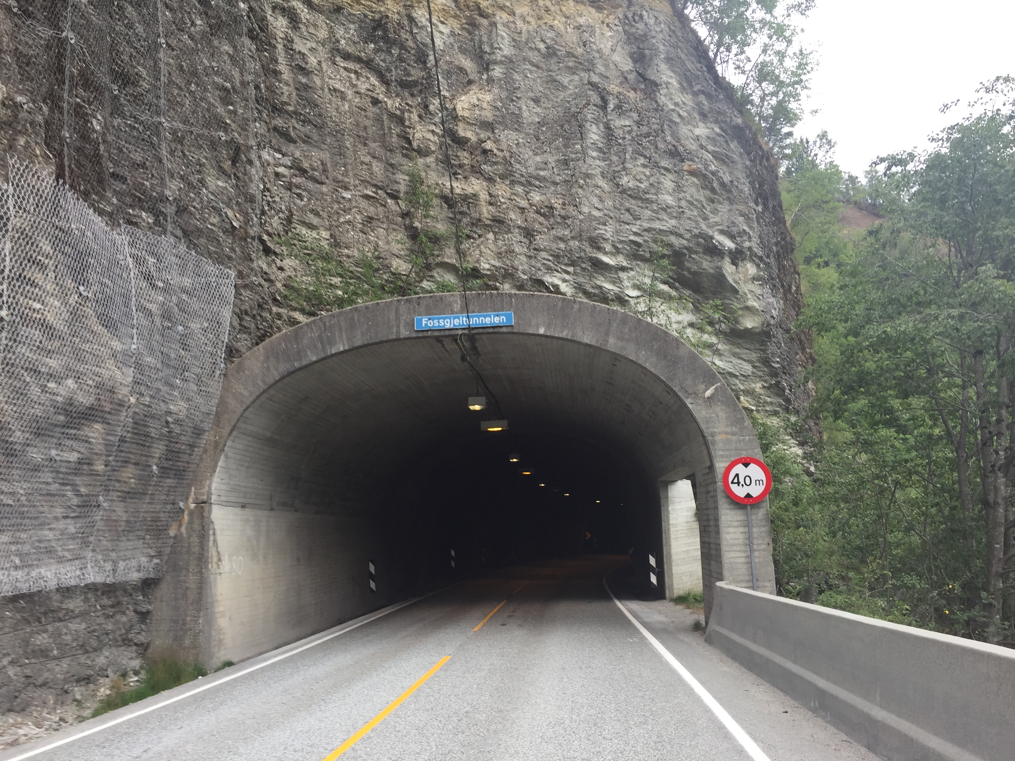 Fossgjeltunnelen